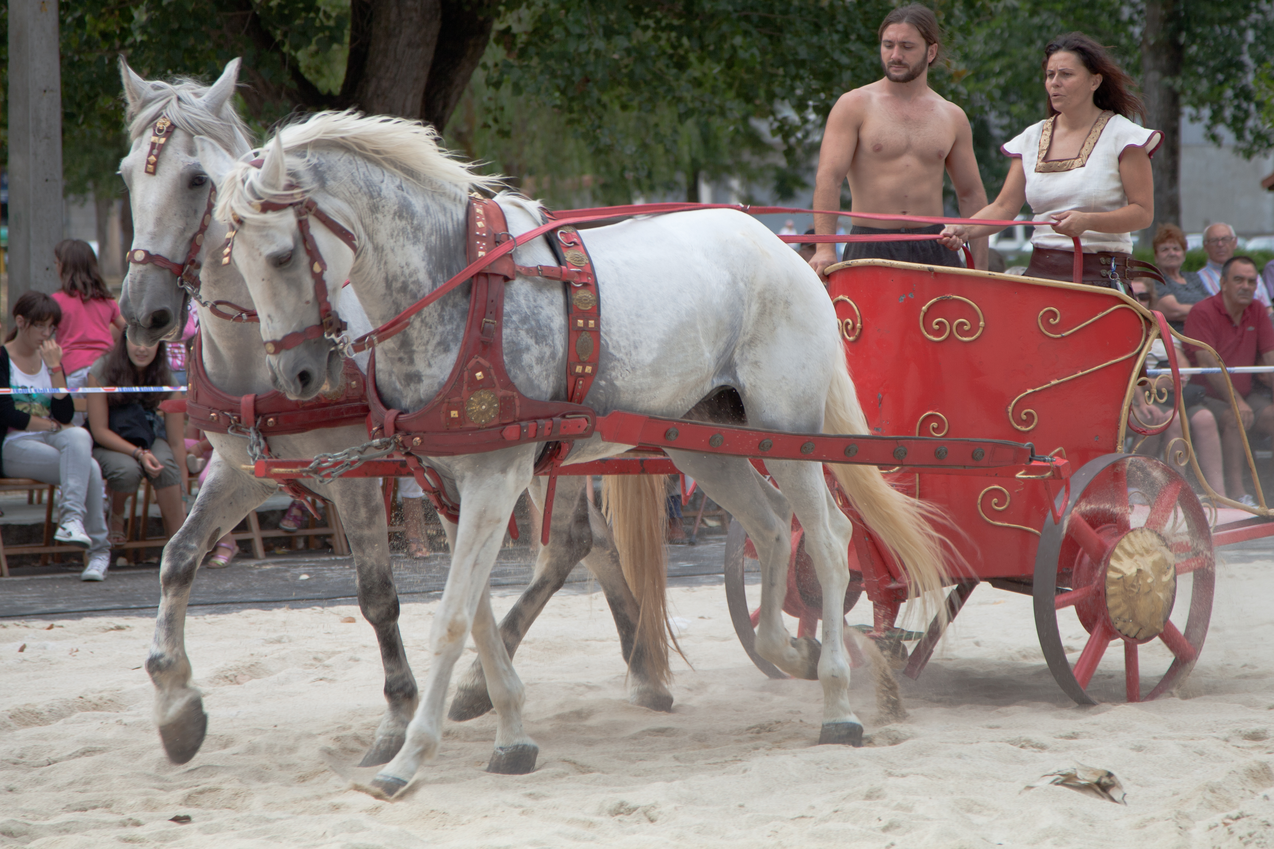 Biga. Festa do esquecemento. Xinzo de Limia, Ourense, Galicia.